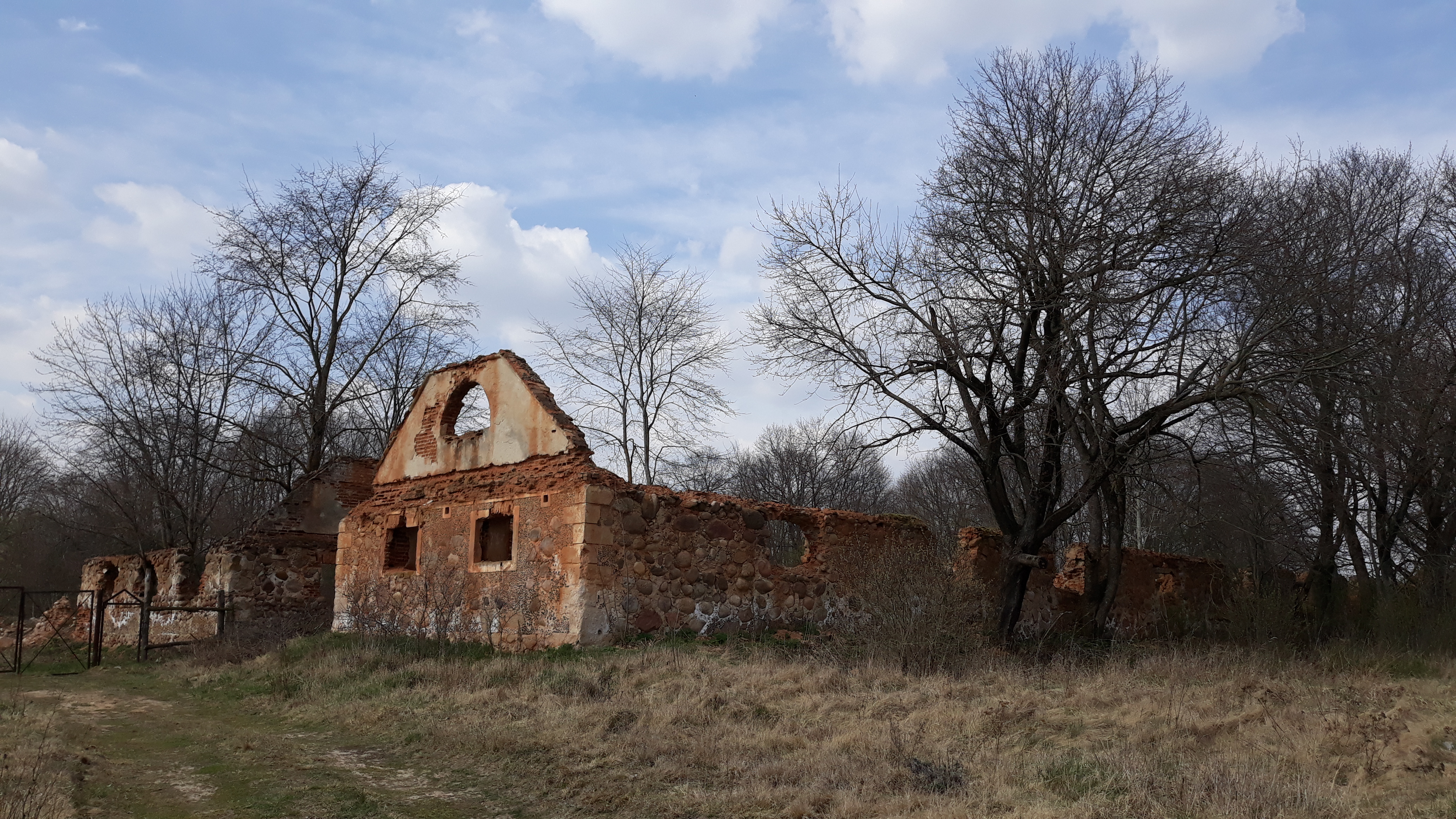 Краявіды